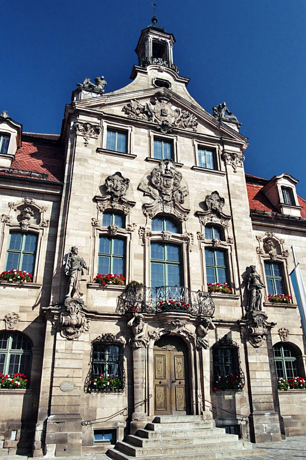 Das heutige Rathaus in Ellingen, Bayern.